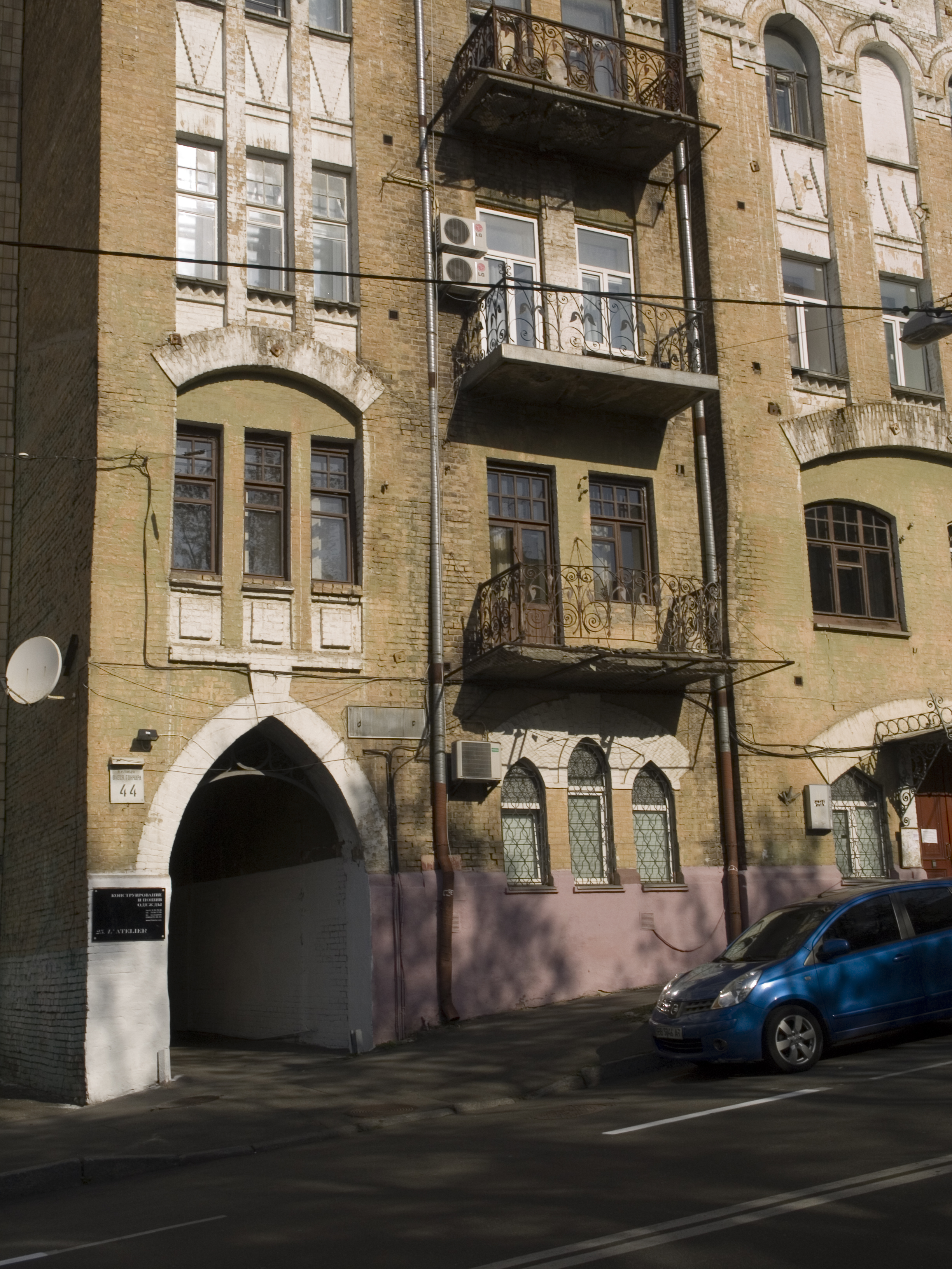 Україна, Київ - вул. Гончара, 44 - Будинок прибутковий